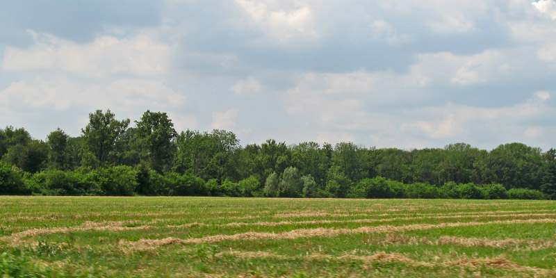 Origgio campagna